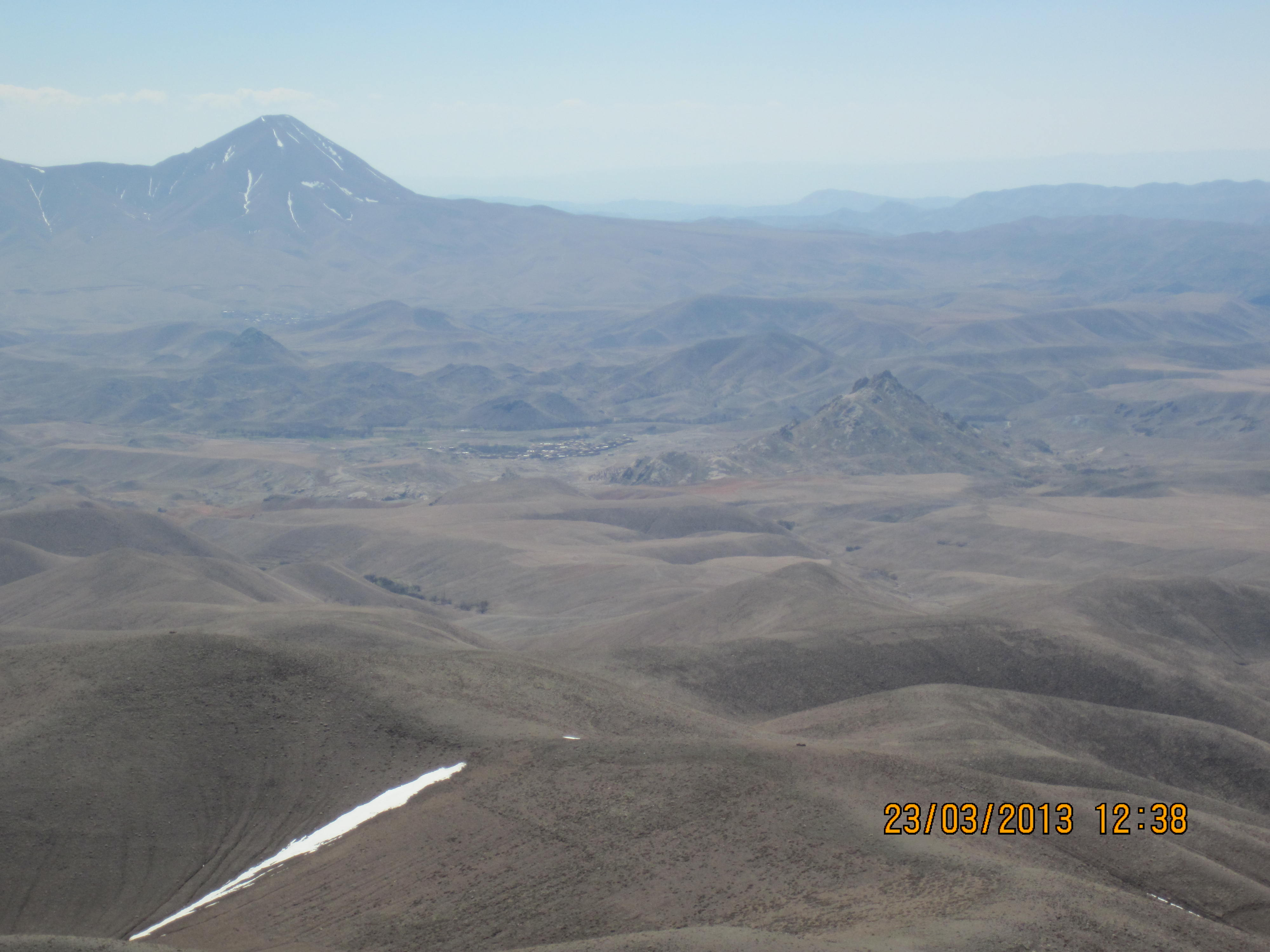 دره ی زیبای کوه مجمد بیگ